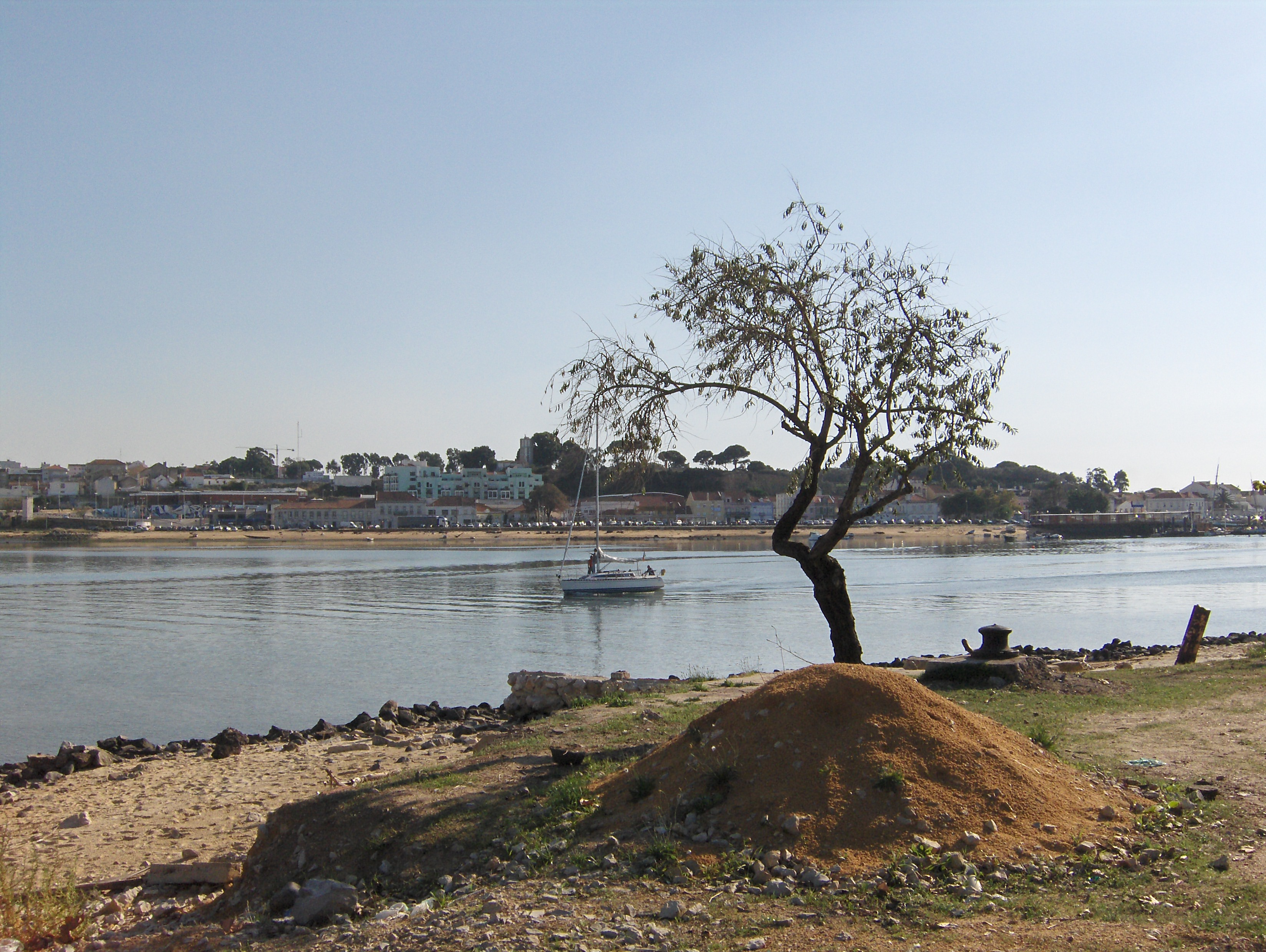 Vista sobre a marginal do Seixal (ao fundo); Fotografia tirada da Ponta dos Corvos